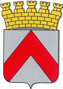 Wapen van Harelbeke. Het wapenschild van de stad Harelbeke wordt heraldisch zo omschreven: 'in zilver een keper van keel, het schild getopt met een stedekroon met vijf torens van goud'.